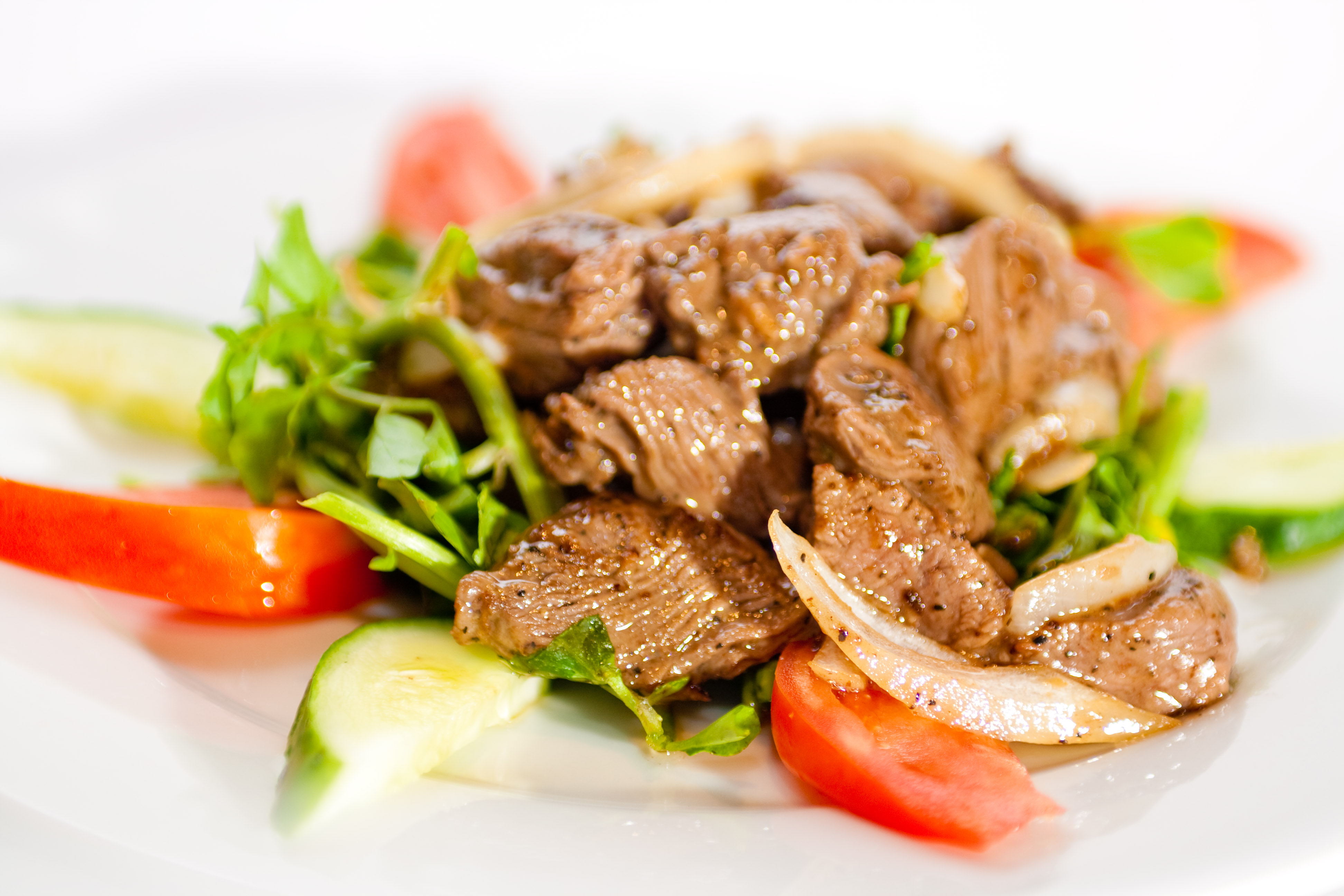 Bœuf Loc Lac